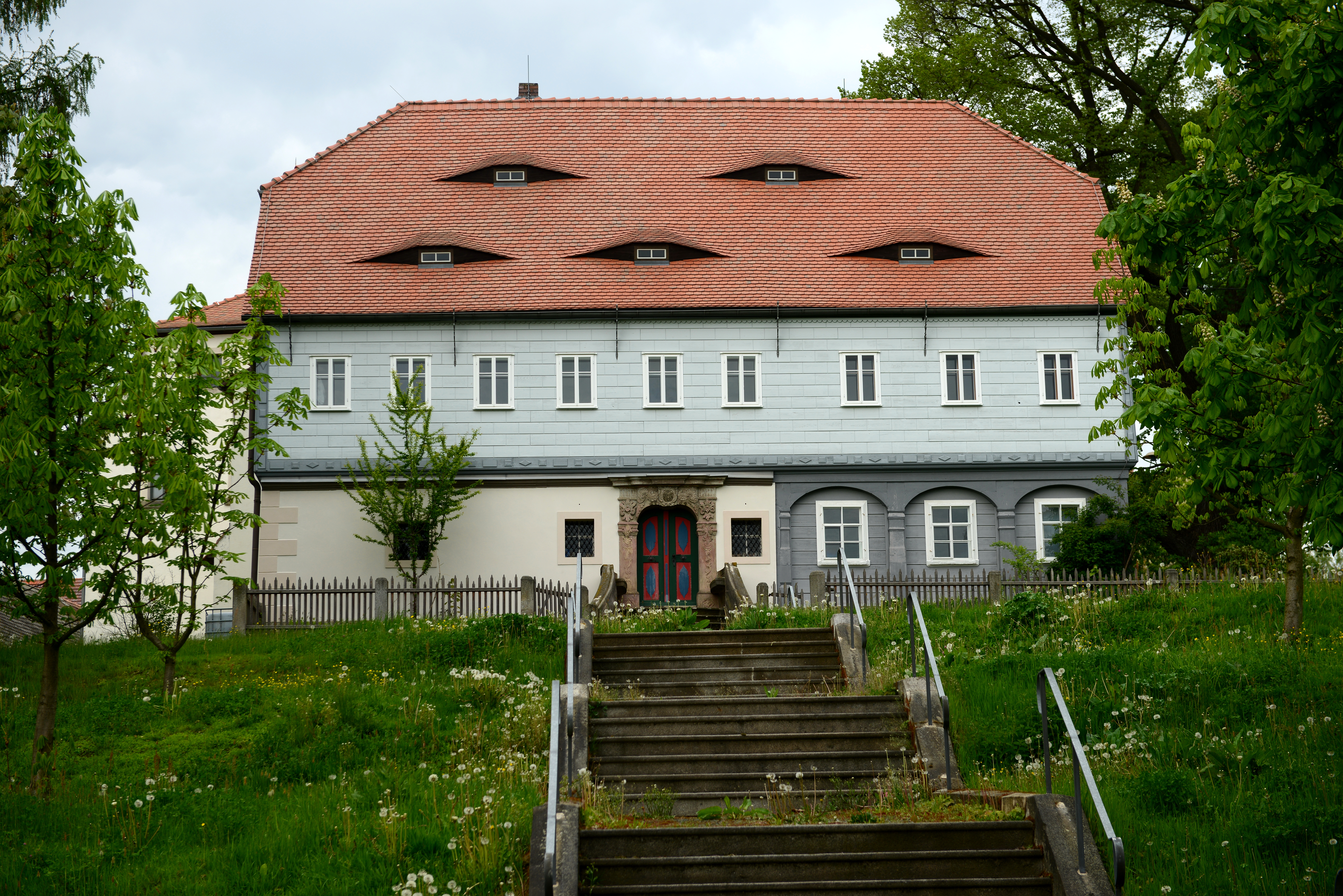 Umgebindehäuser in Seifhennersdorf Wikipedians in Seifhennersdorf This photo was taken during the project Wikipedians in Seifhennersdorf in May 2014. Supported by Wikimedia Deutschland, Wikimedia Österreich, Wikimedia Polska and Wikimedia Czech Republic.